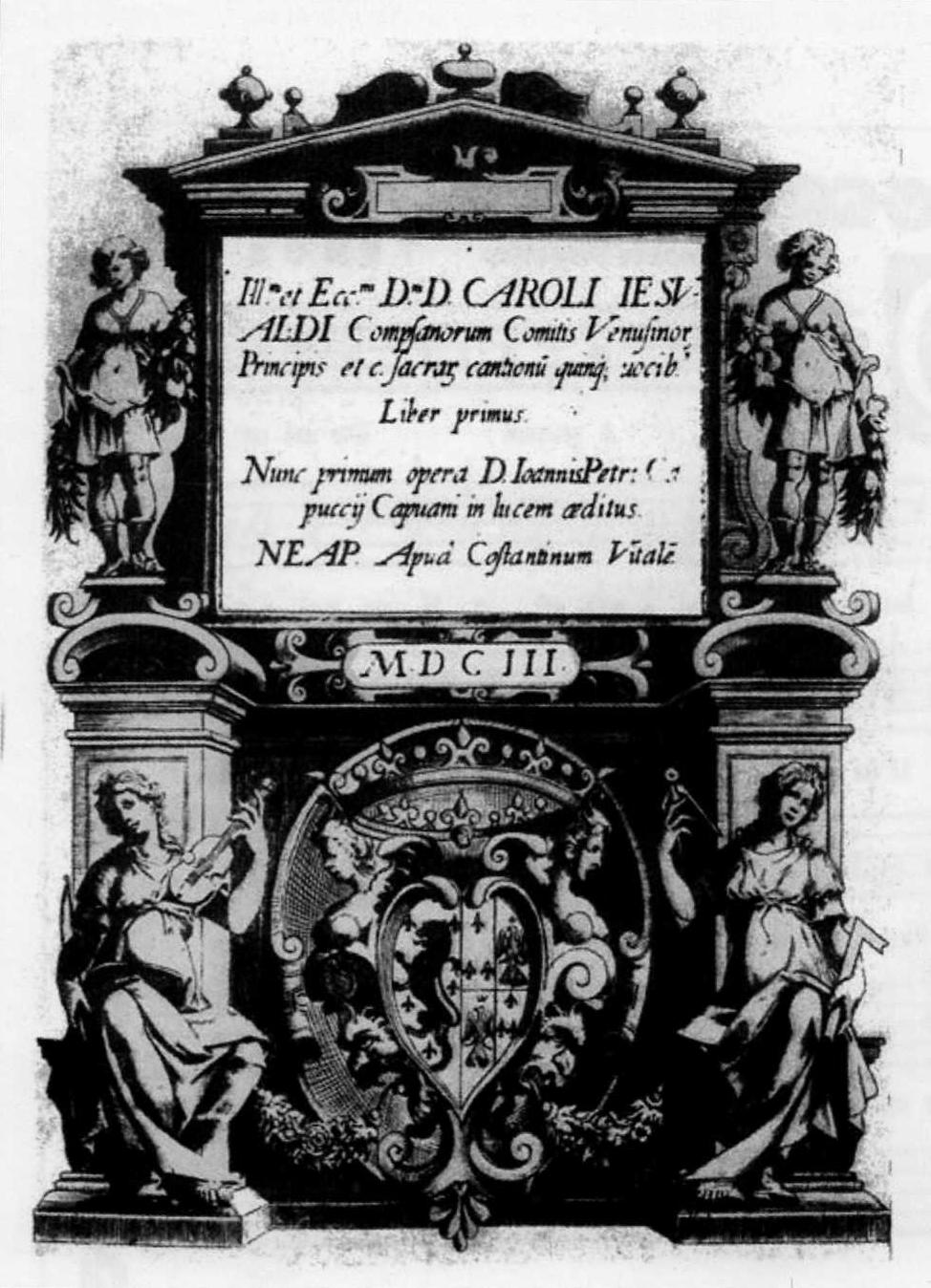 Gesualdo Sacrae Cantiones a sei voci